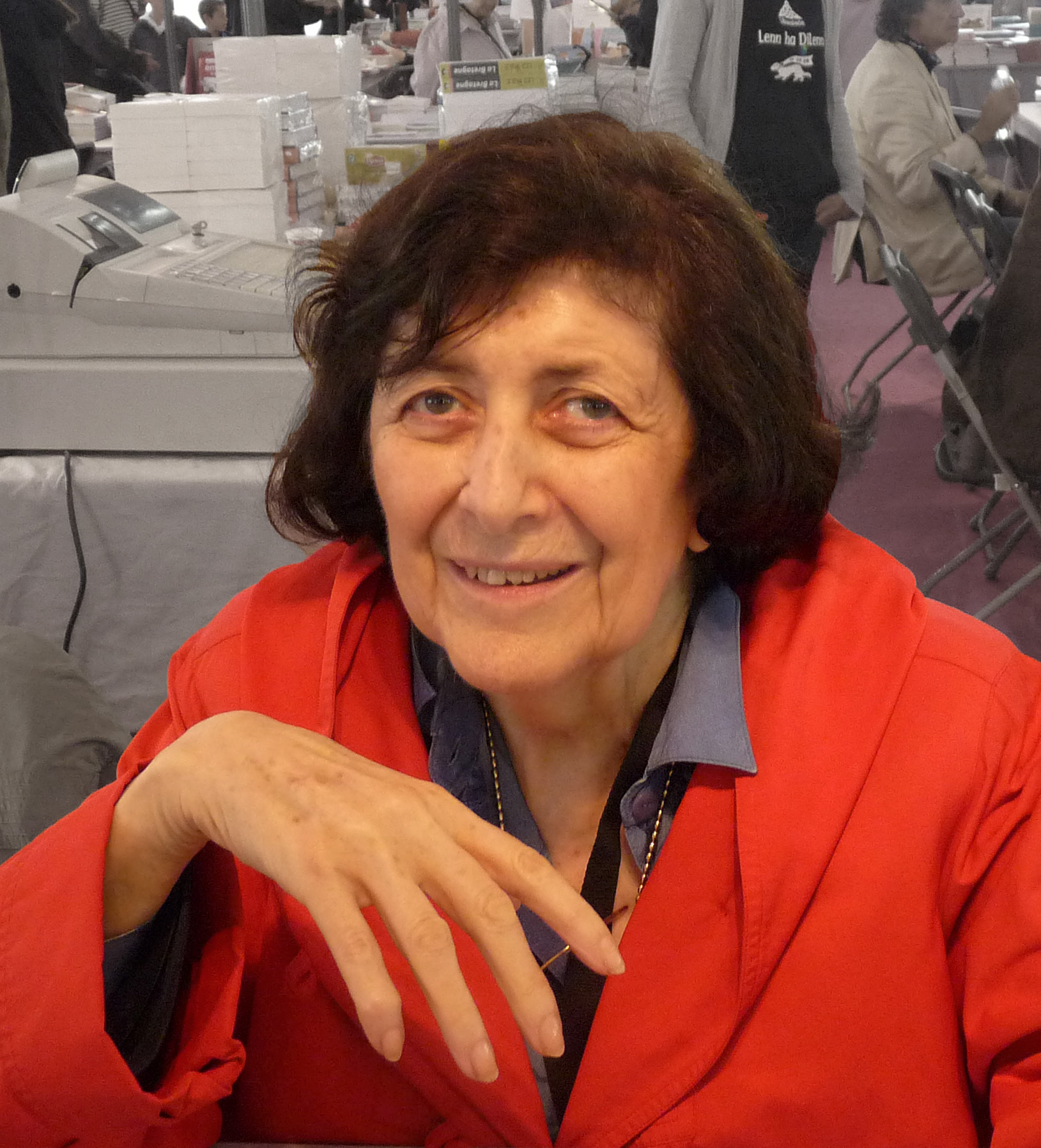 Henriette Walter au Salon du livre en Bretagne (Vannes, Morbihan)